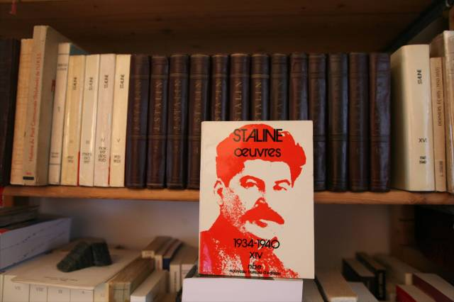 Oeuvres complètes de Staline en anglais et en français